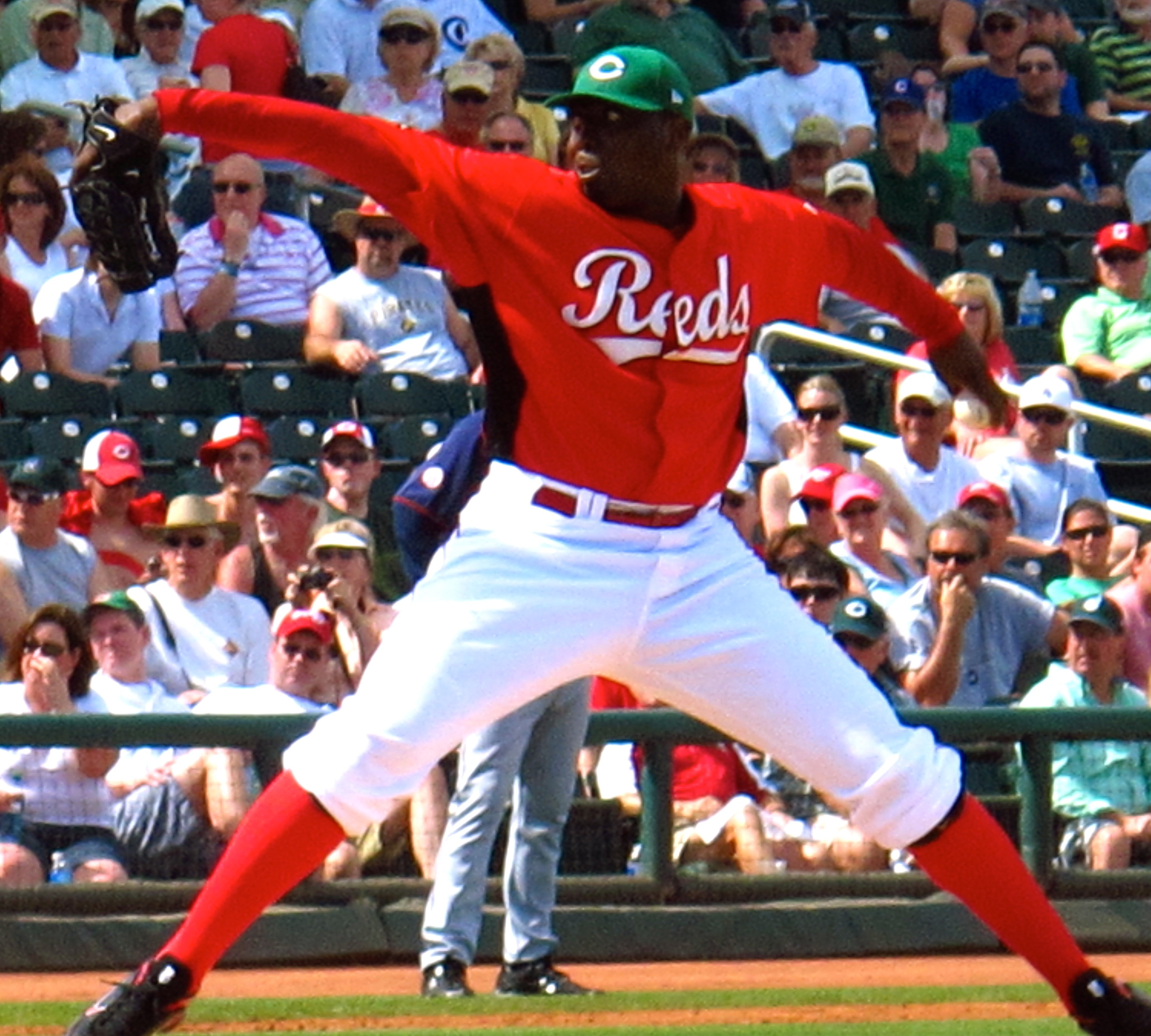 Dontrelle Willis